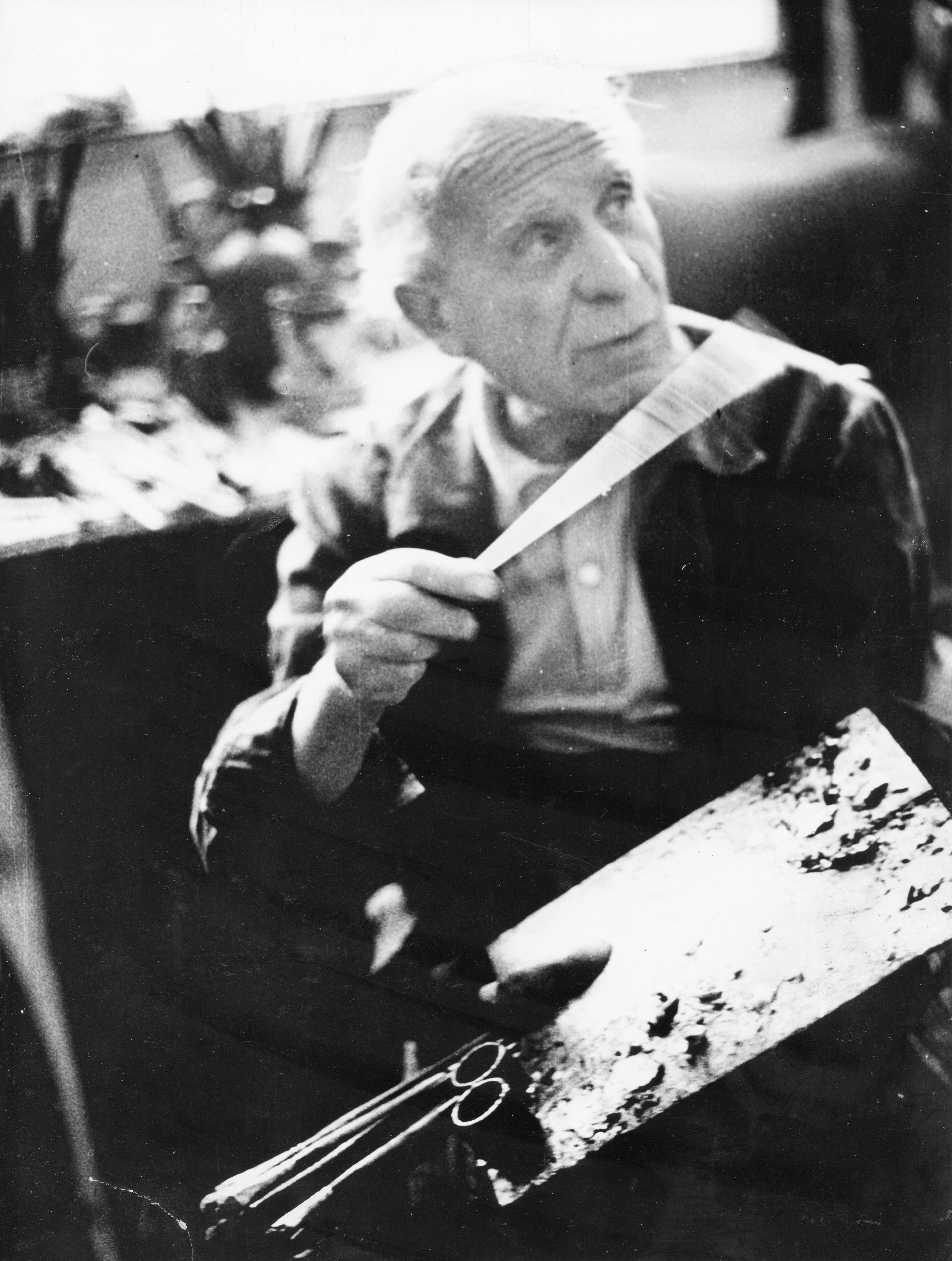 Czóbel Béla festőművész. Location: Hungary Tags: painter, celebrity Title: Czóbel Béla festőművész.